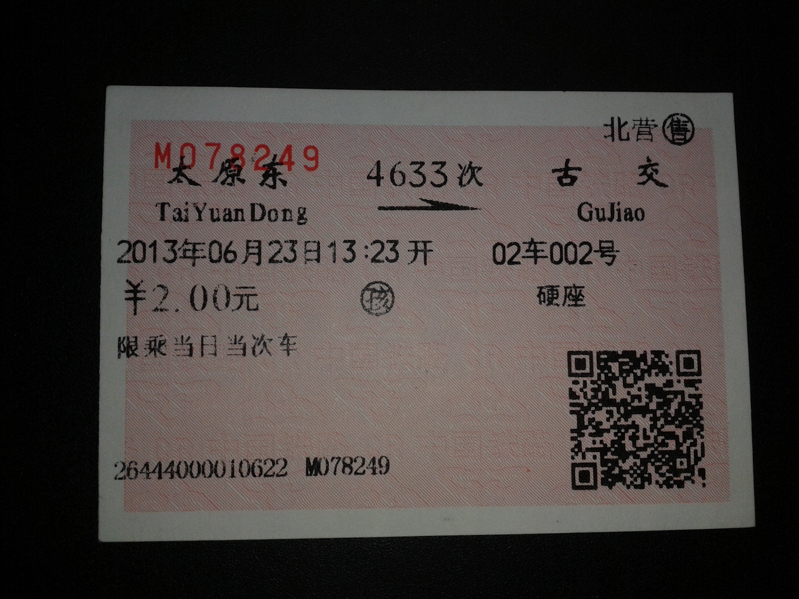 4633次列车 太原东-古交区间车票 北营售